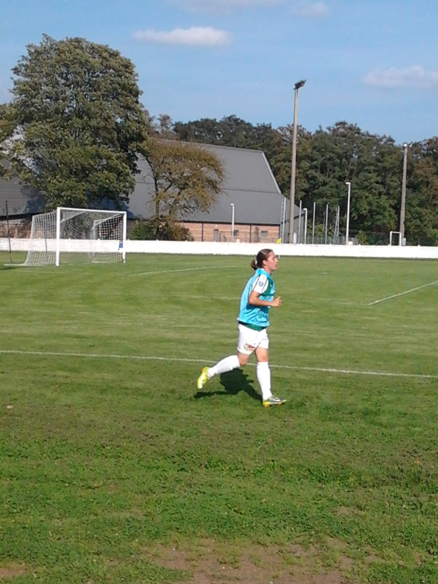 Photo de Tiffany Monsauret, s'entraînant pour la seconde mi-temps du match Hénin-Beaumont/Juvisy (0-9) en 2011